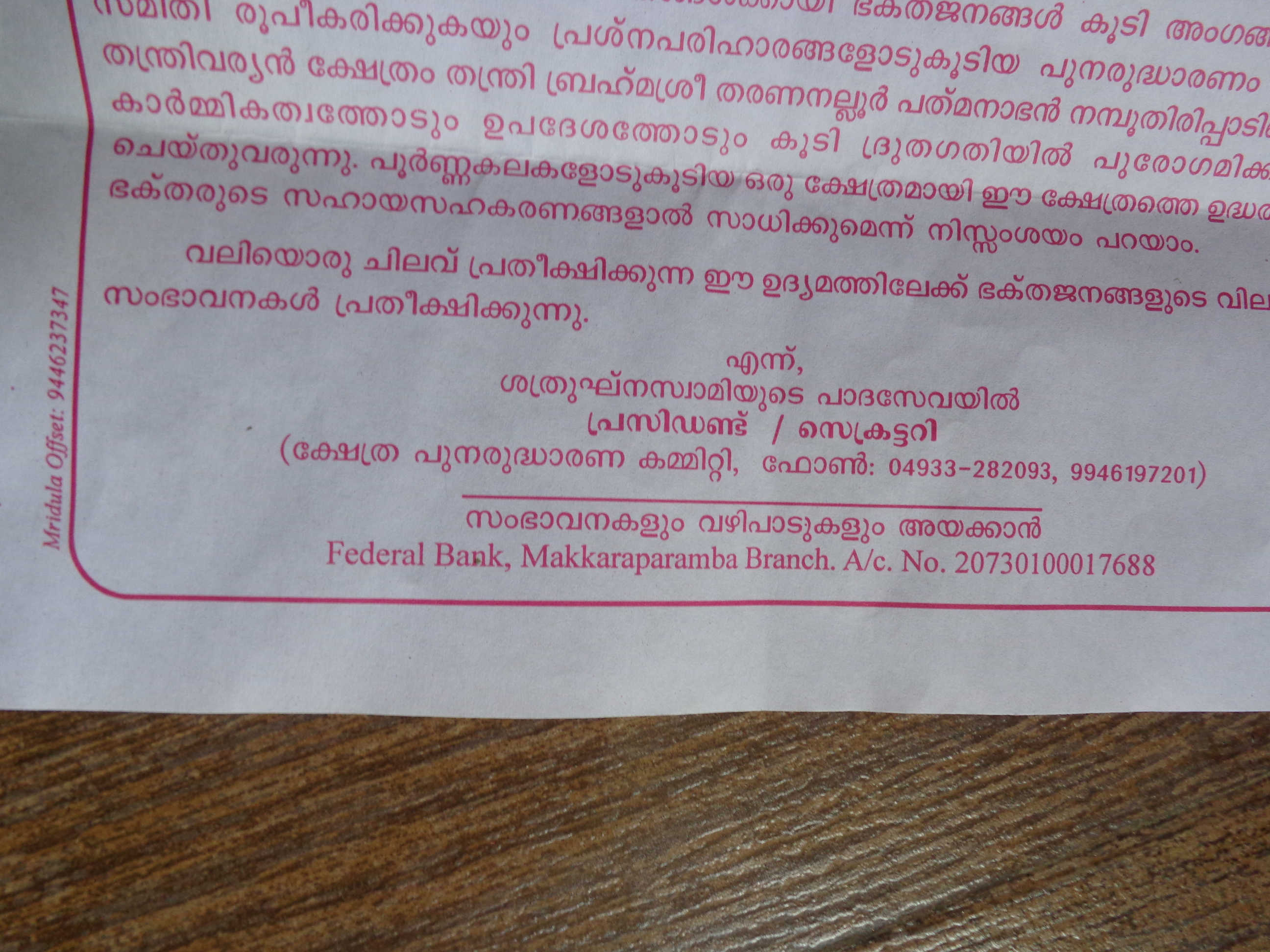 shatrughna temple, details of their address